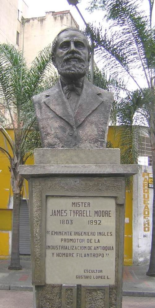 Busto de James Tyrrell Moore, ubicado en la Av. la Playa, Medellín, Colombia